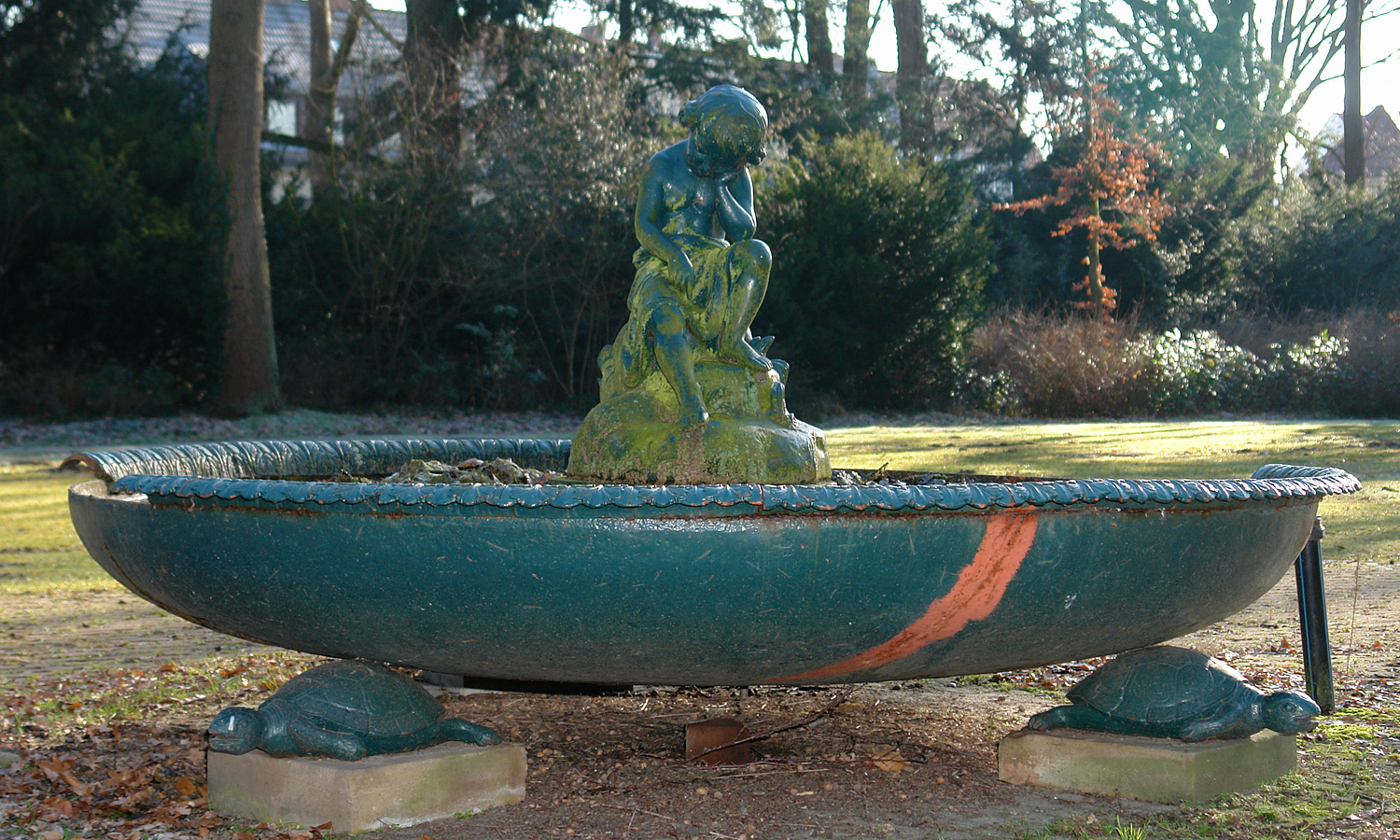 Osterholzer Friedhof in Bremen: Kunsthandwerker-Brunnen. Gestaltung: 1863 durch Bildhauer Diedrich Samuel Kropp. Herstellung: Eisengießerei Osenbrück (Hemelingen). Material: Gusseisen. Ehemaliger Standort: Villa Rüpel, Schwachhauser Chaussee (heute Kippenberg-Gymnasium) Das abgebildete Objekt ist ein geschütztes Kulturdenkmal in der Freien Hansestadt Bremen, mit der Nr. 0969,T005 beim Landesamt für Denkmalpflege registriert.